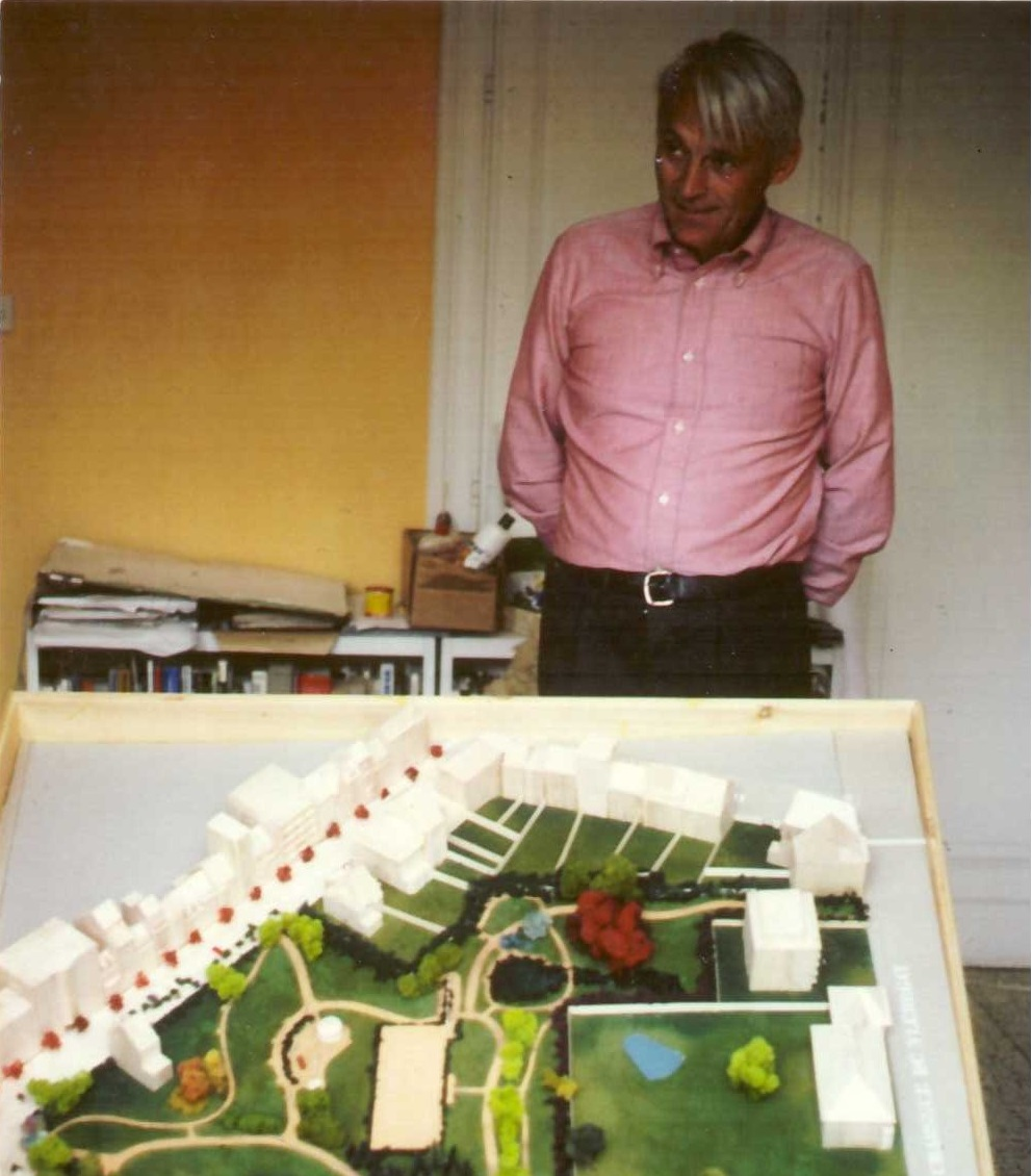 Mr Stefanovitch présentant sa maquette du futur parc Tenbsoch